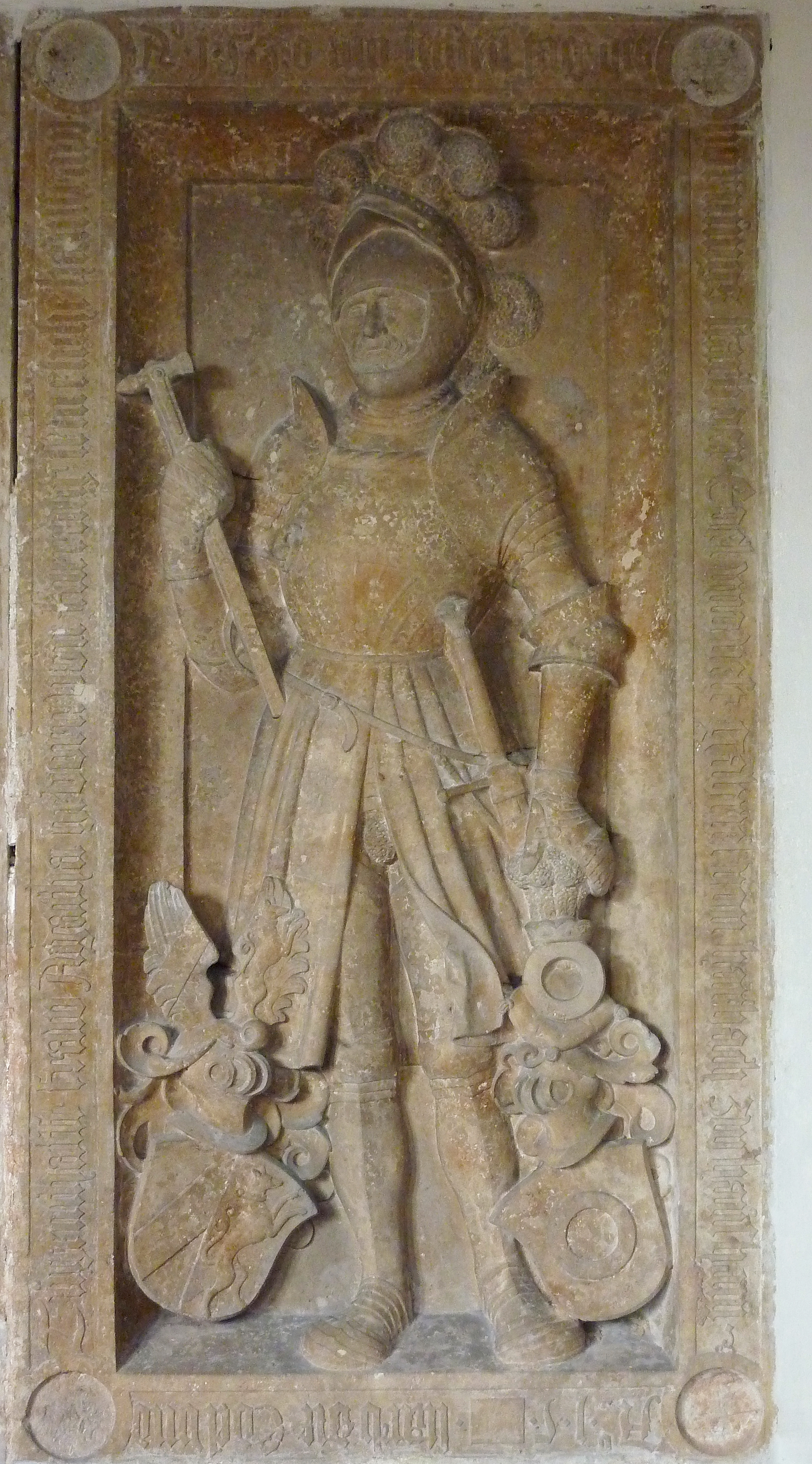 Evangelisch-lutherische Dreifaltigkeitskirche in Haunsheim, einer Gemeinde im Landkreis Dillingen an der Donau (Bayern), Epitaph für Gabriel von Harbach, gest. 1530, und seiner Gemahlin Agatha geb. von Knöringen, unter der Empore